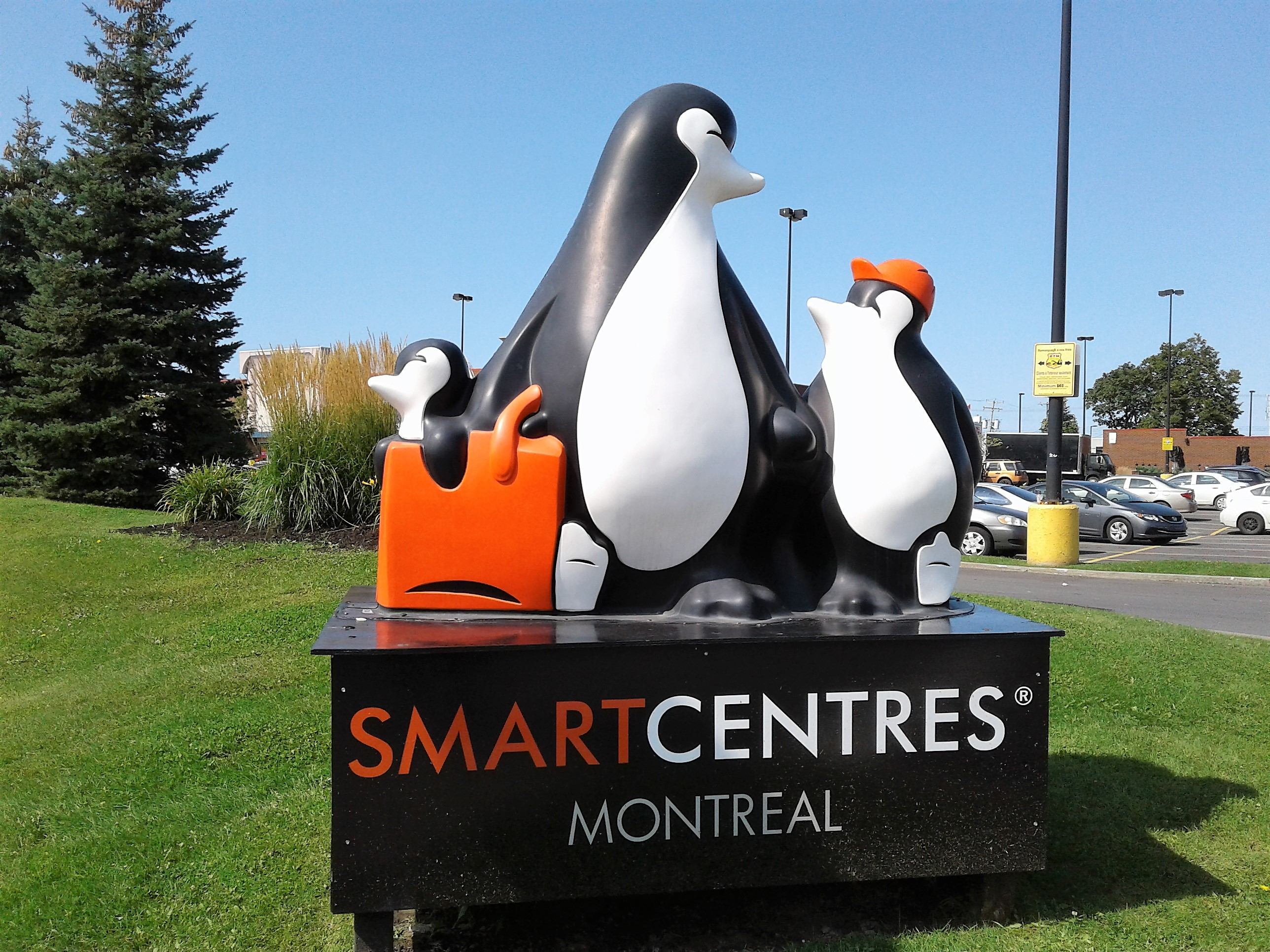 SmartCentres Montréal (Decarie), 5400, rue Jean-Talon Ouest, Montréal, Québec